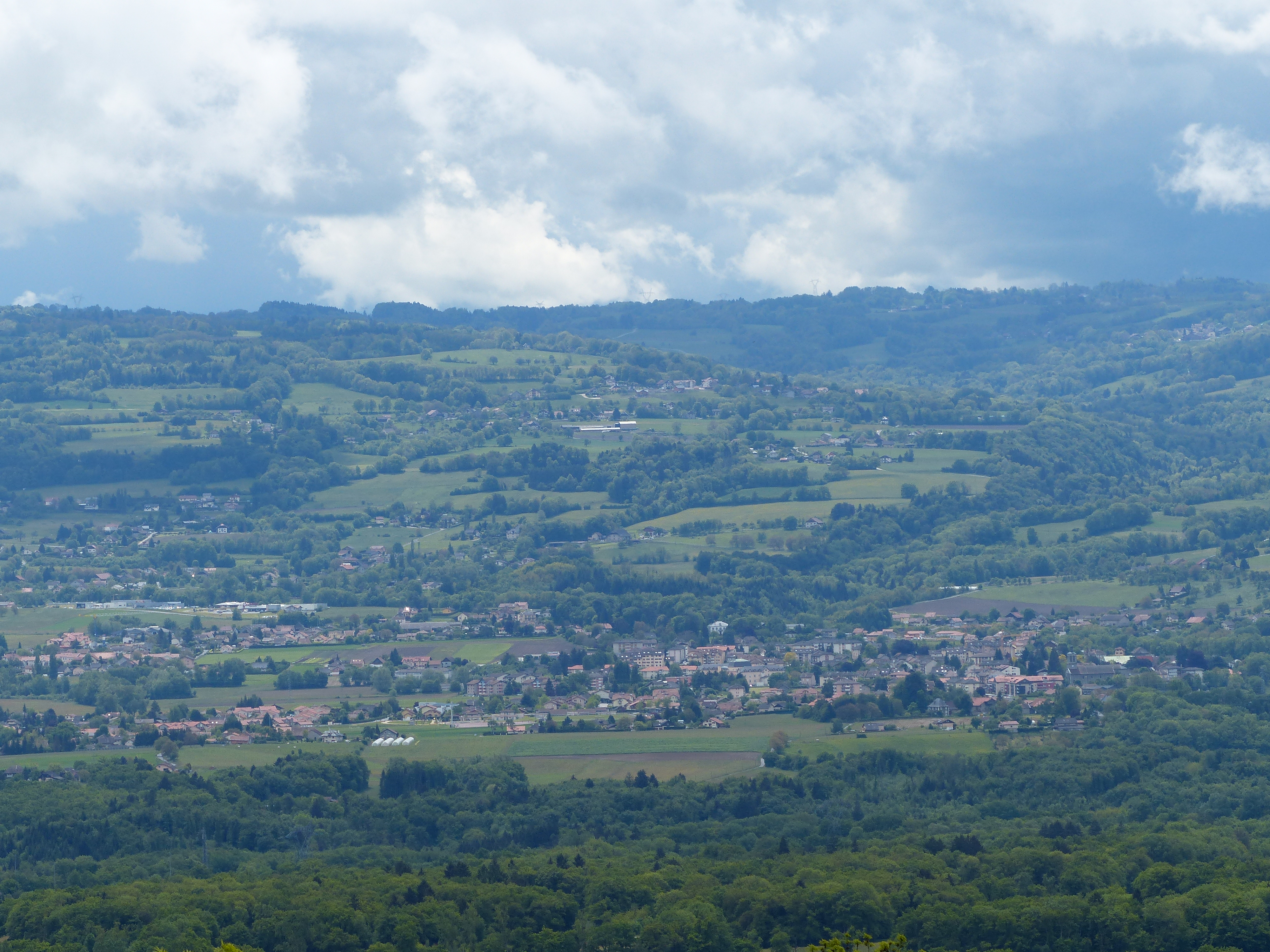 Reignier Haute-savoie, vu de Lucinges, Haute-savoie